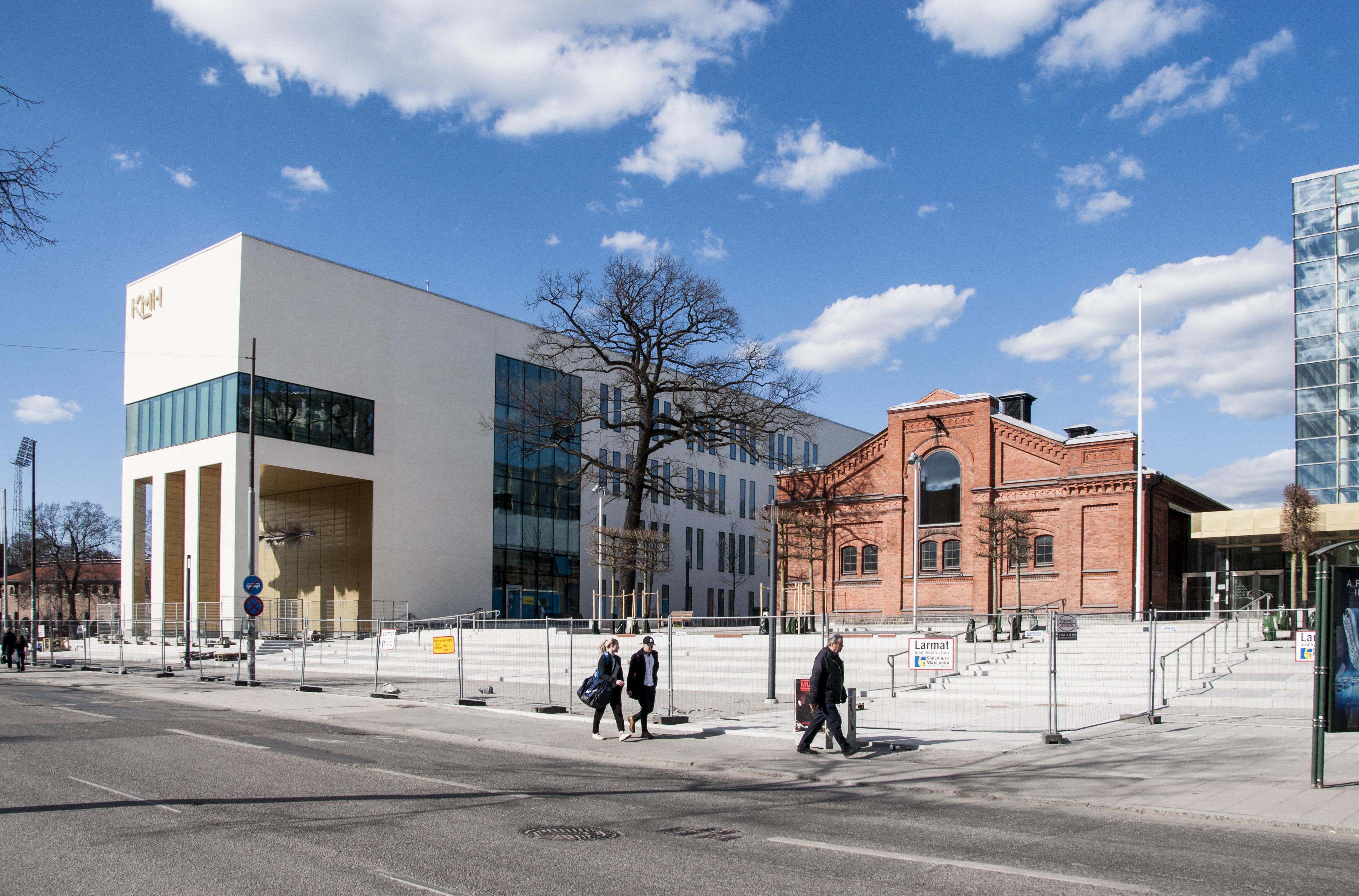 Kungliga Musikhögskolan i Stockholm, 2016. Arkitekter AIX arkitekter.